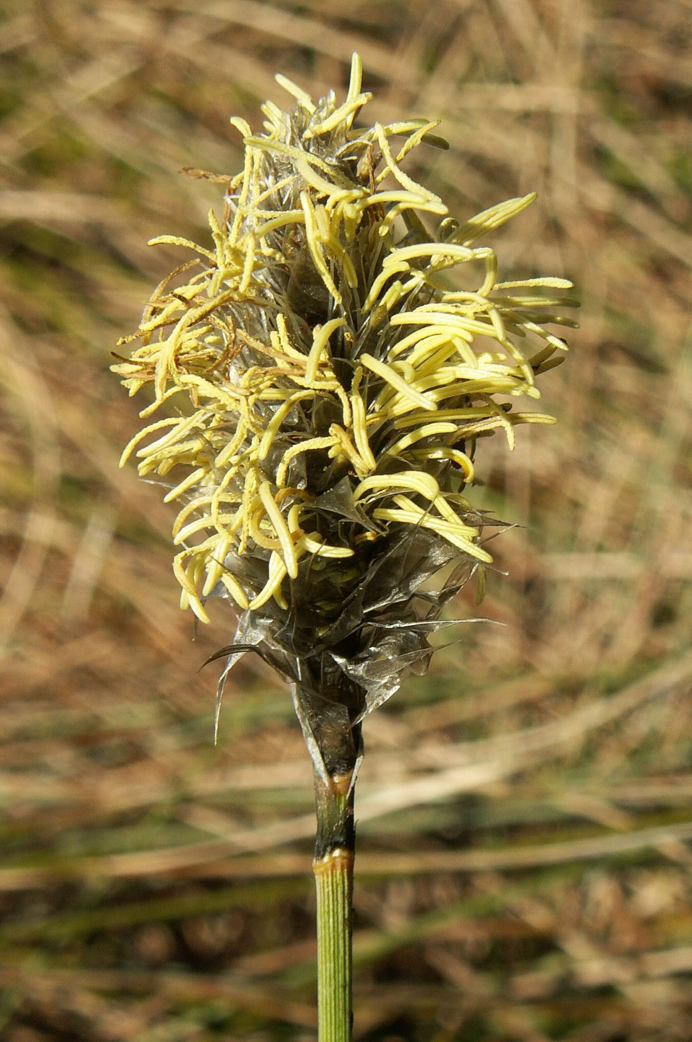 Eriophorum vaginatum, inflorescence. Samlino, NW Poland